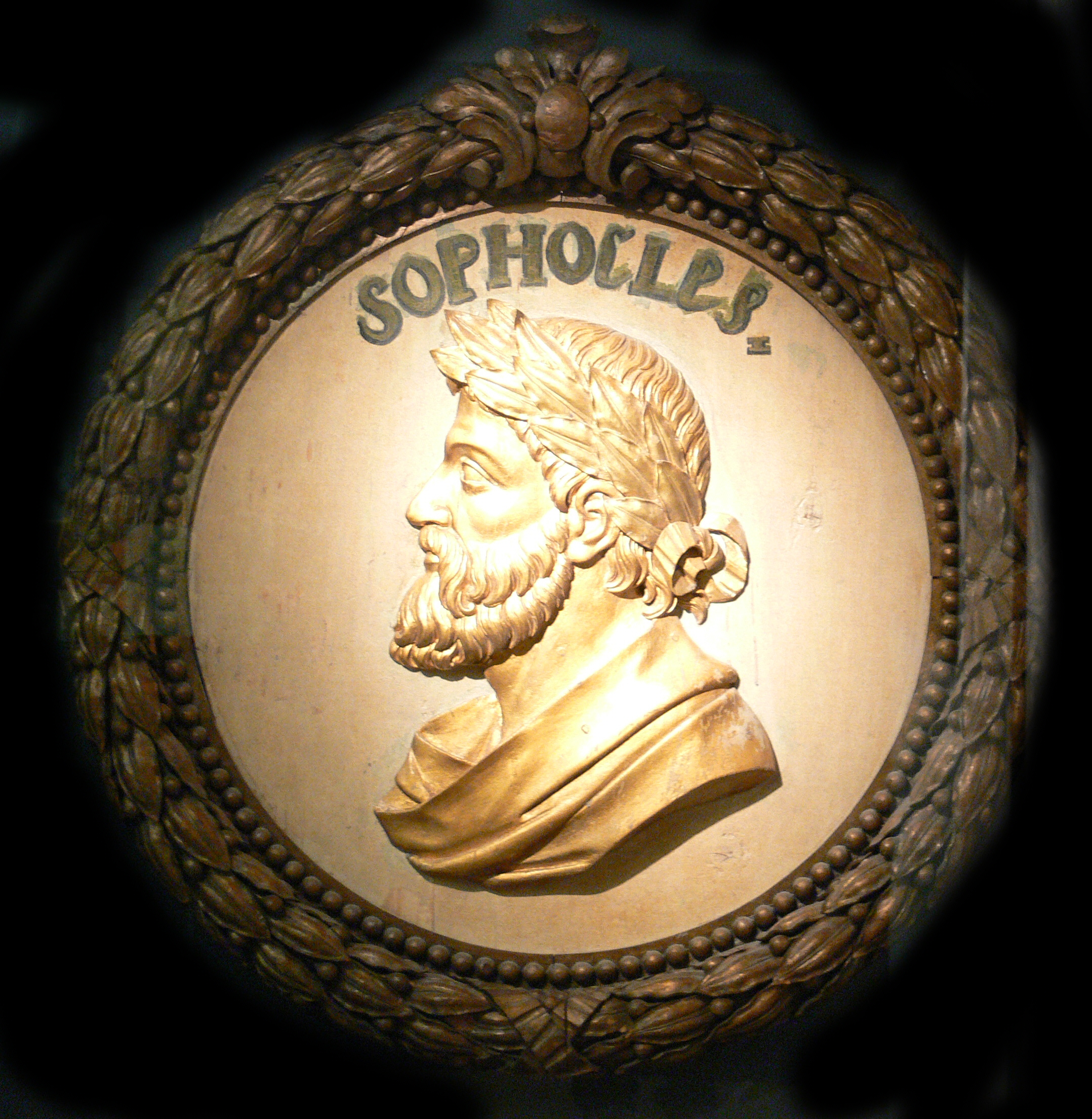 Sophokles-Tondo, Mannheim um 1777, einziges erhaltenes Teil der Innenausstattung des im 2. Weltkrieg zerstörten alten Nationaltheaters Mannheim (B3) Collection: Reiss-Engelhorn-Museen, Mannheim